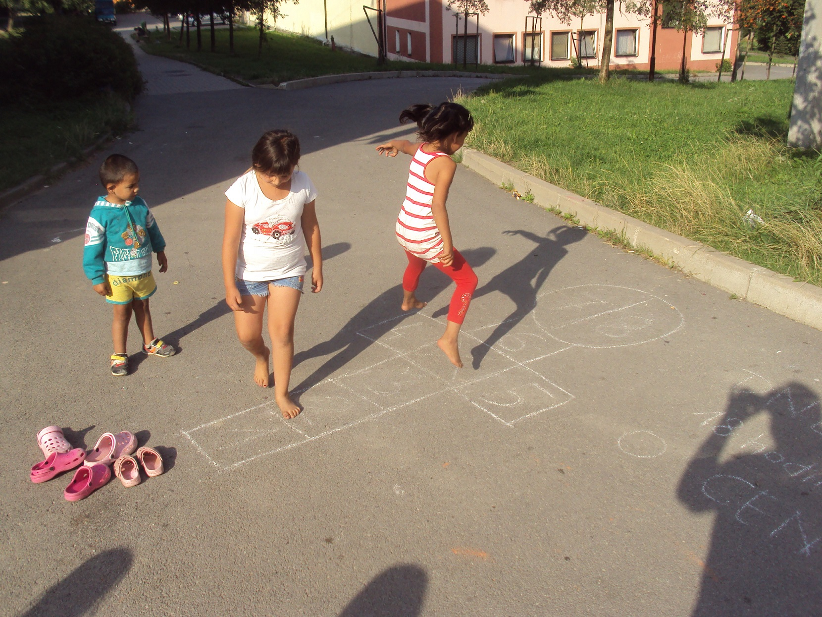 Hra Skákání na panáka, Nové Zákupy